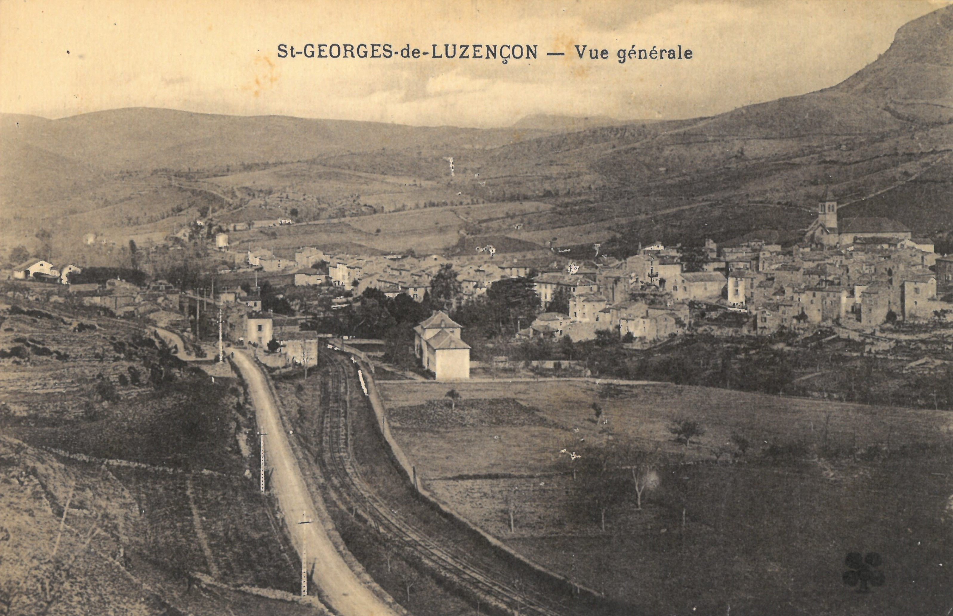 Saint-Georges-de-Luzençon : Vue générale. Carte postale envoyée le 6 juillet 1930.